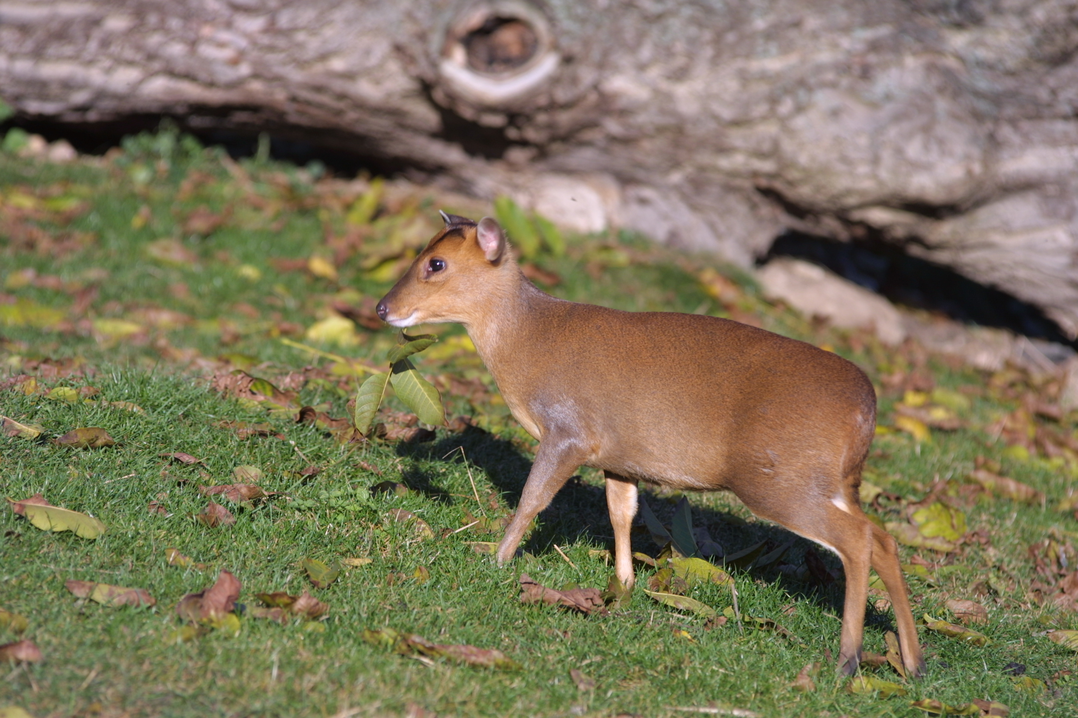 Muntžak malý v Zoo Plzeň.